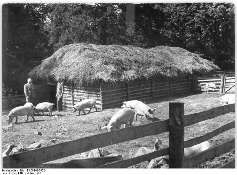 Illus-Biscan Gr-Leu. 18.10.50 Schweinezucht auf dem Tierhauptzuchtgut Hundisburg bei Magdeburg. In der Schweinezucht des Tierhauptzuchtgutes Hundisburg bei Magdeburg beruhen die guten Ergebnisse zum Teil auf der besonderen Konstruktion und Einrichtung der Schweineställe. Diese bestehen aus aufgeschichteten Strohballen, die nur durch einige Bretter zusammengehalten werden. Der Stallboden zeichnet sich durch eine besondere Festigkeit aus. Er enthält eine Mischung aus Glas, Schlacke und Ziegeln. Die Wände sind so isoliert, dass sie Kälte, Zugluft und auch die Ratten fernhalten. UBz, Die Vorteile dieses Schweinestalles bestehen darin, dass er im Sommer keine Hitze speichert und im Winter nicht zu kalt ist. In solchen Ställen entwickeltn sich die Schweine besonders gut. Information added by Wikimedia users.